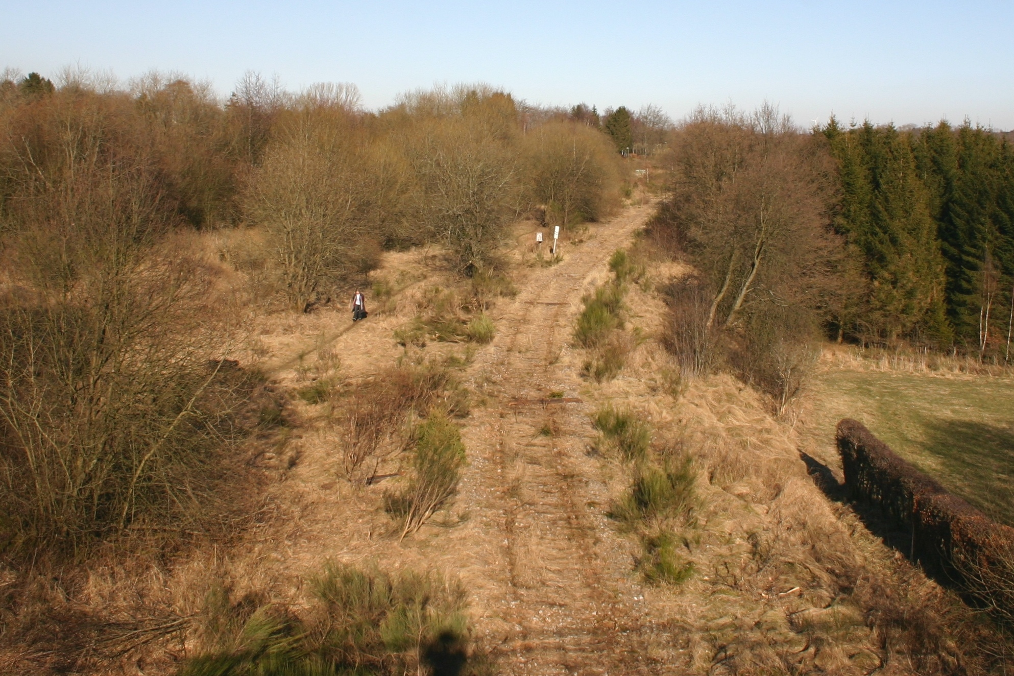 Vennbunn vun der Bréck zu Mützenich a Richtung Gare Monschau.